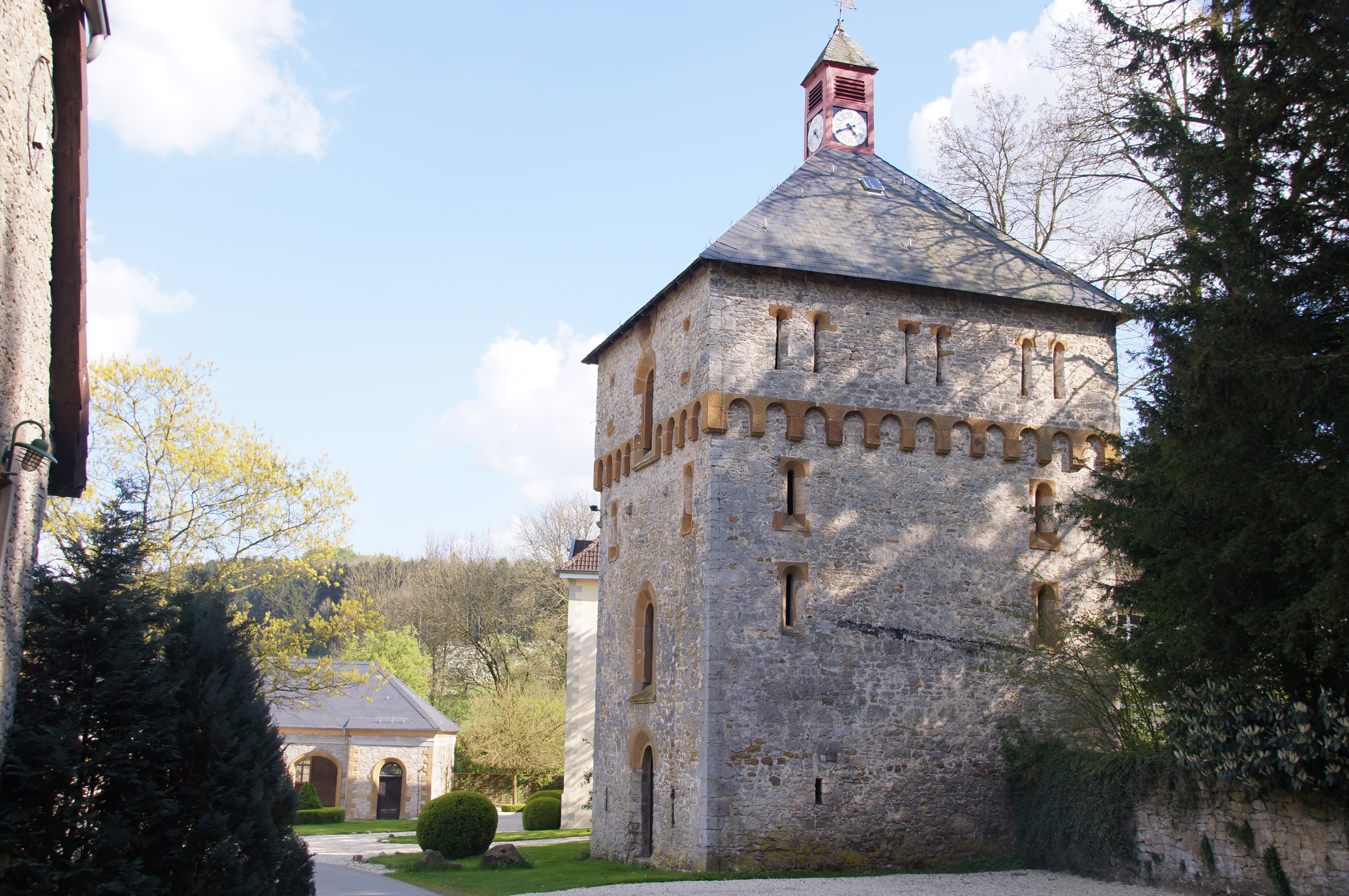 Gut Barkhausen in Leopoldshöhe, Germany This is a photograph of an architectural monument.